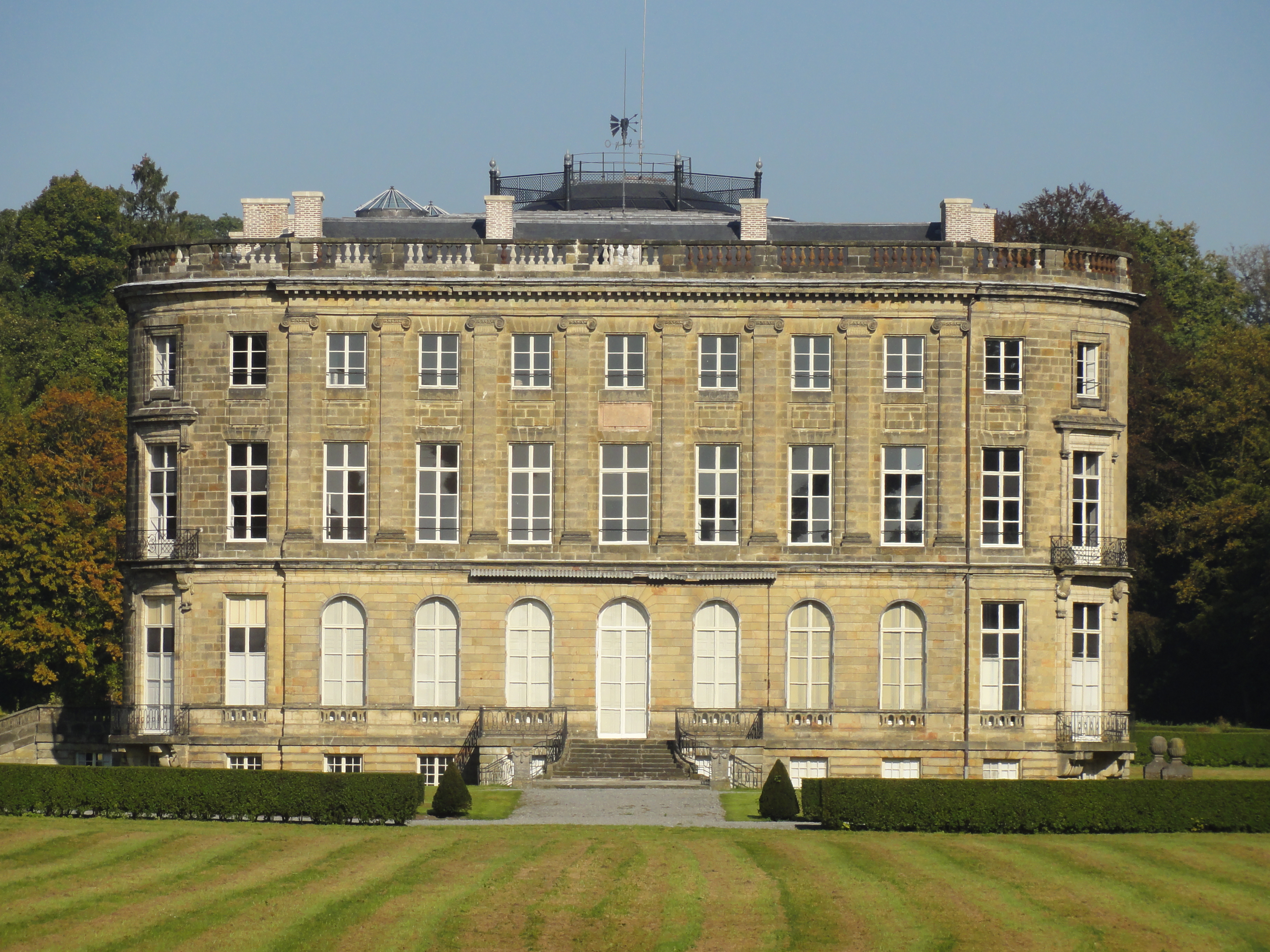 Château de l'Hermitage, lieu de la fondation de la Compagnie des mines d'Anzin, Condé-sur-l'Escaut, Nord, Nord-Pas-de-Calais, France. .